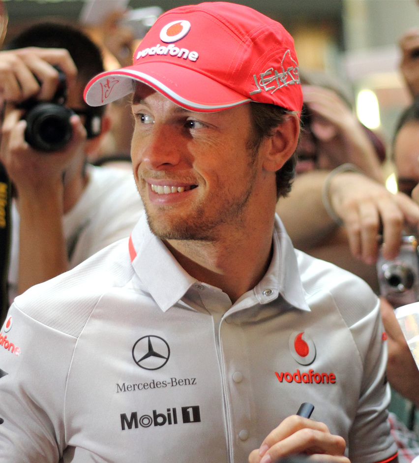 Jenson Button at Hungarian GP 2010 weekend